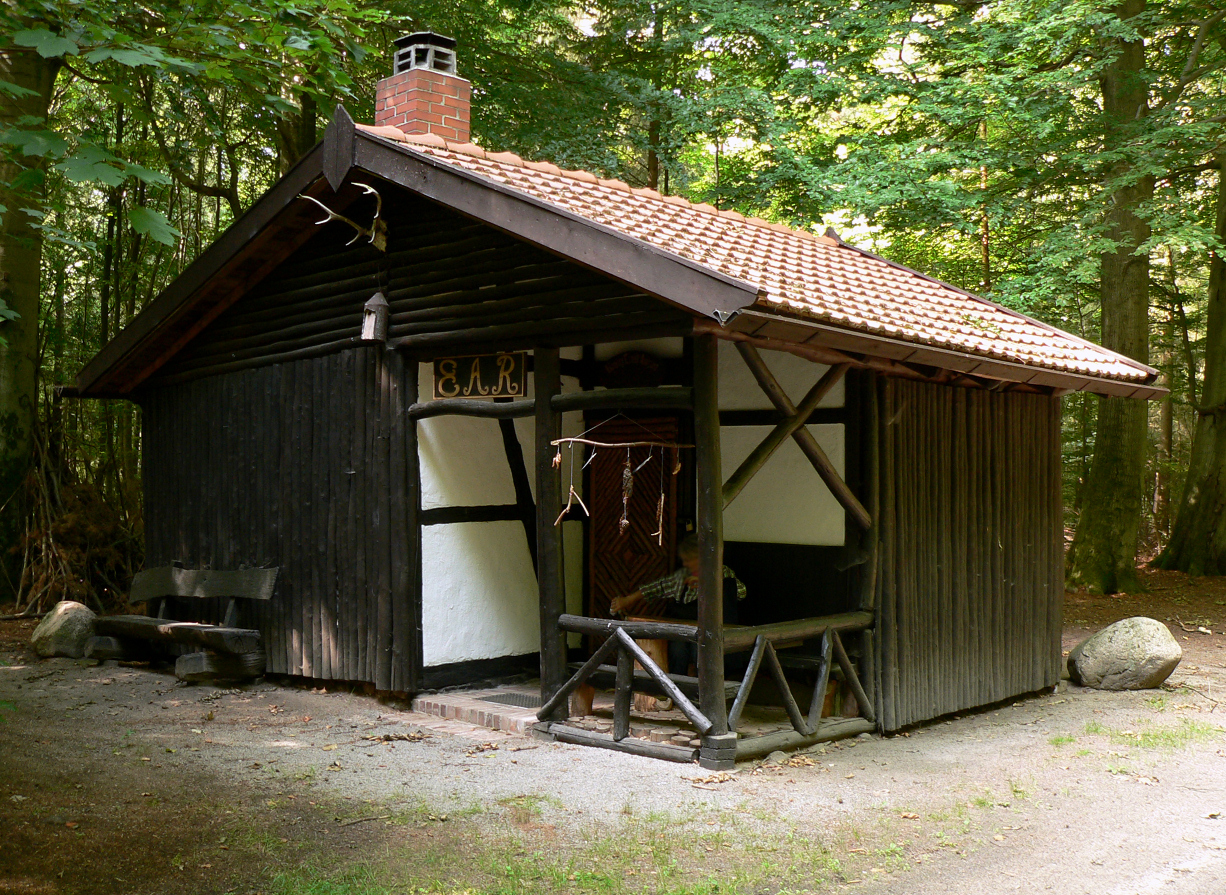 Jagdhütte im Grinderwald, 1967 von der Deutschen Waldjugend erbaut an der Stelle, an der König Ernst August seine Jagdstand hatte. Aufschrift eines angebrachten Schildes: König Ernst August schoss von diesem Stande ab 1843 und 1845 im Kesseljagen 15 und 12 Sauen